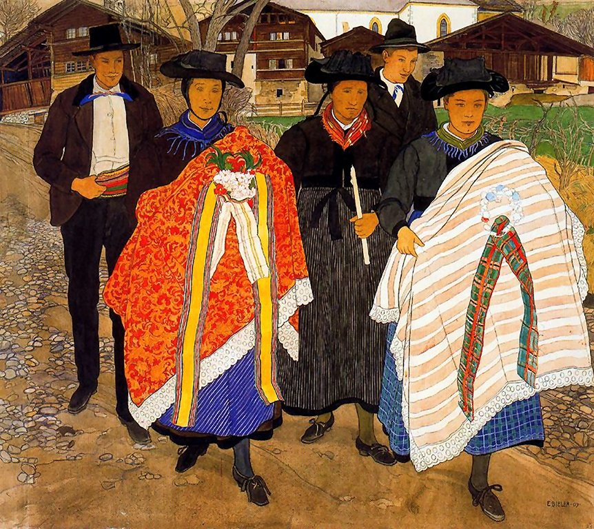 Эрнест Билер (1863-1948)